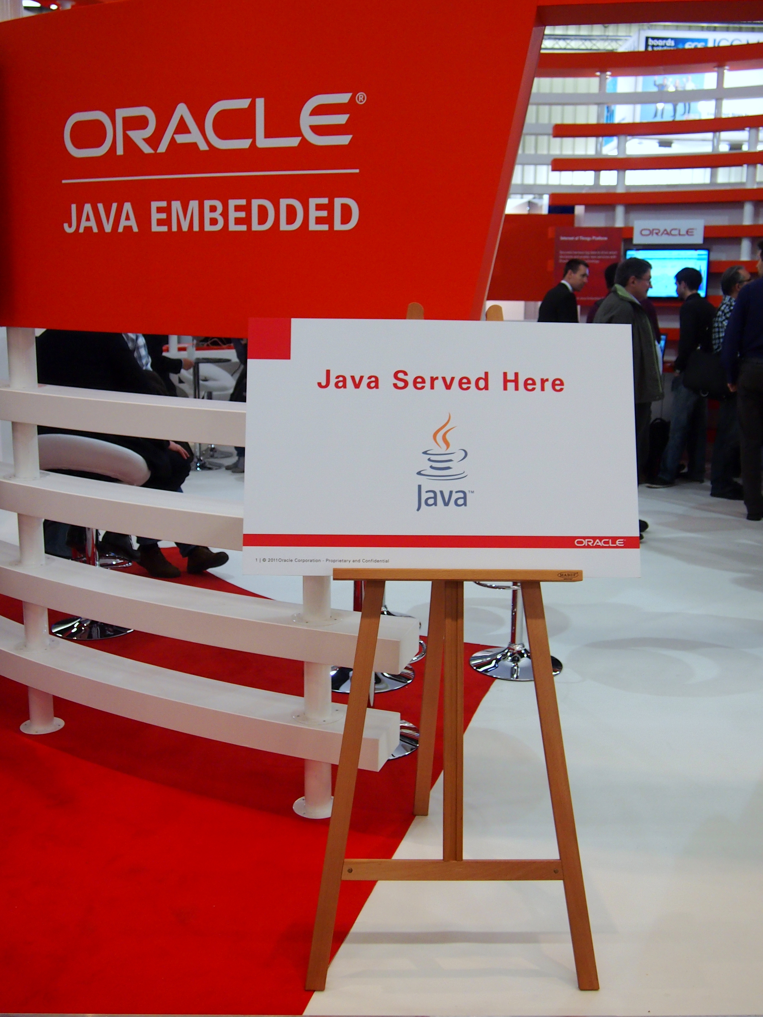 Embedded World 2014: Oracle Stand mit Java und Java Embedded und Schild "Java served here"